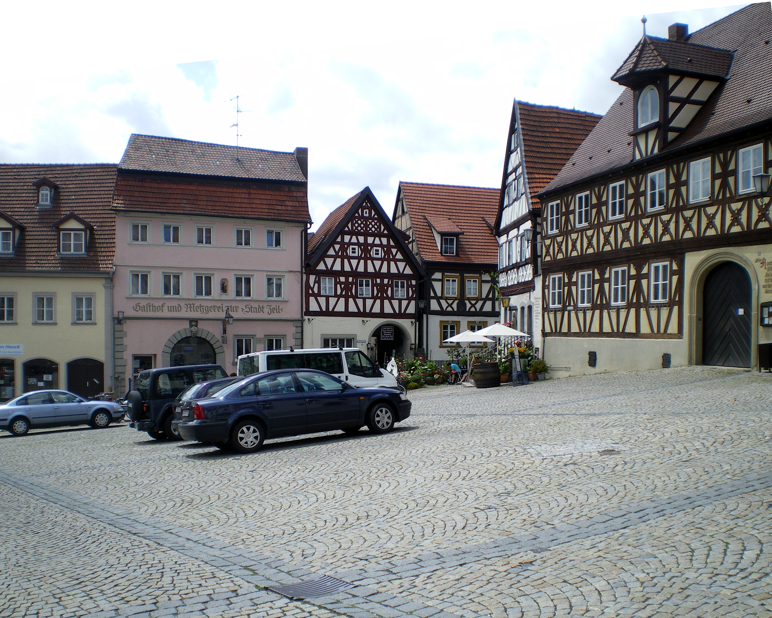 der Marktplatz von Zeil am Main